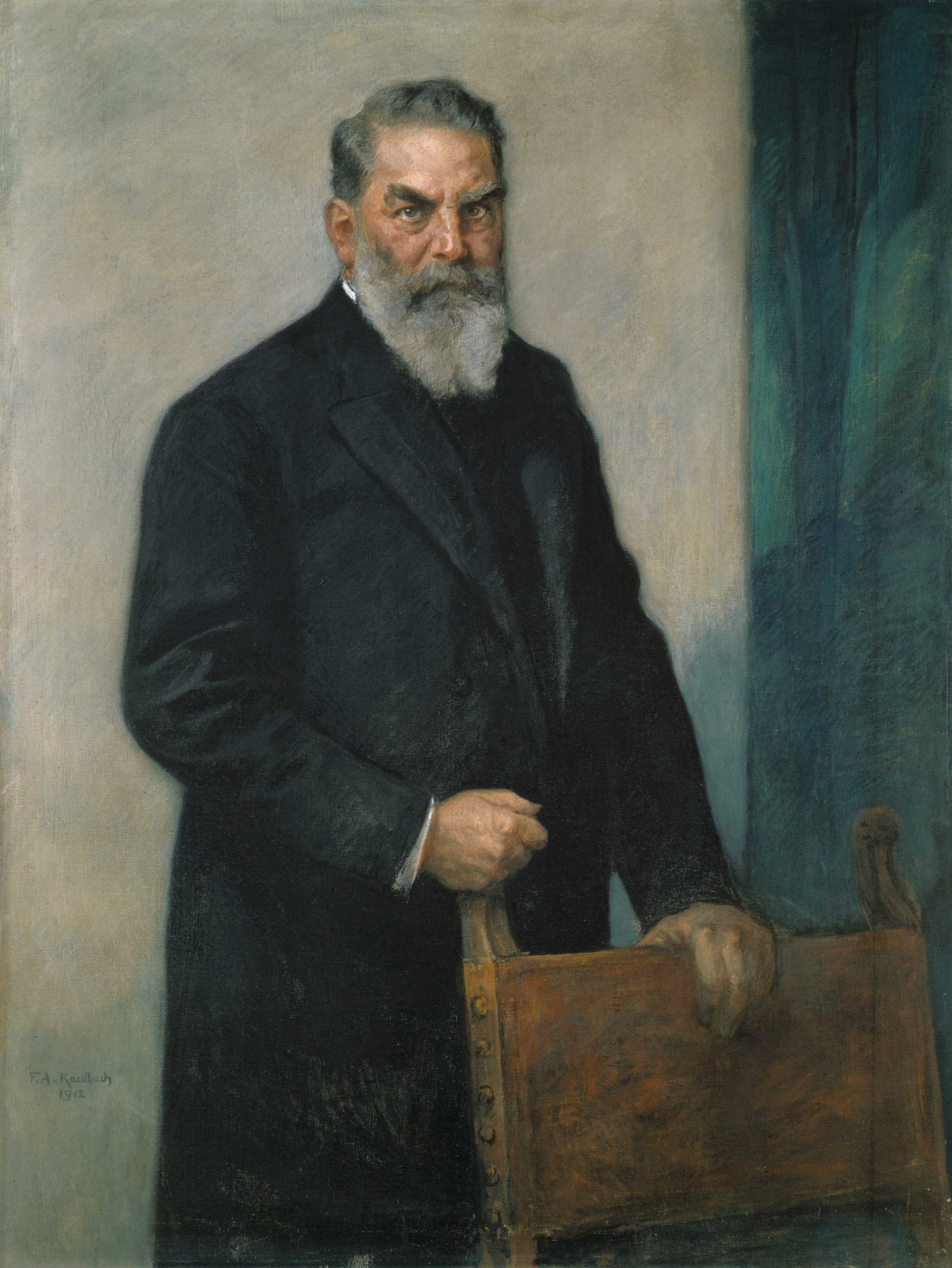 Oskar Von Miller (1855 – 1934). Pintura mostrada en el Deutsches Museum en honor a su creador.